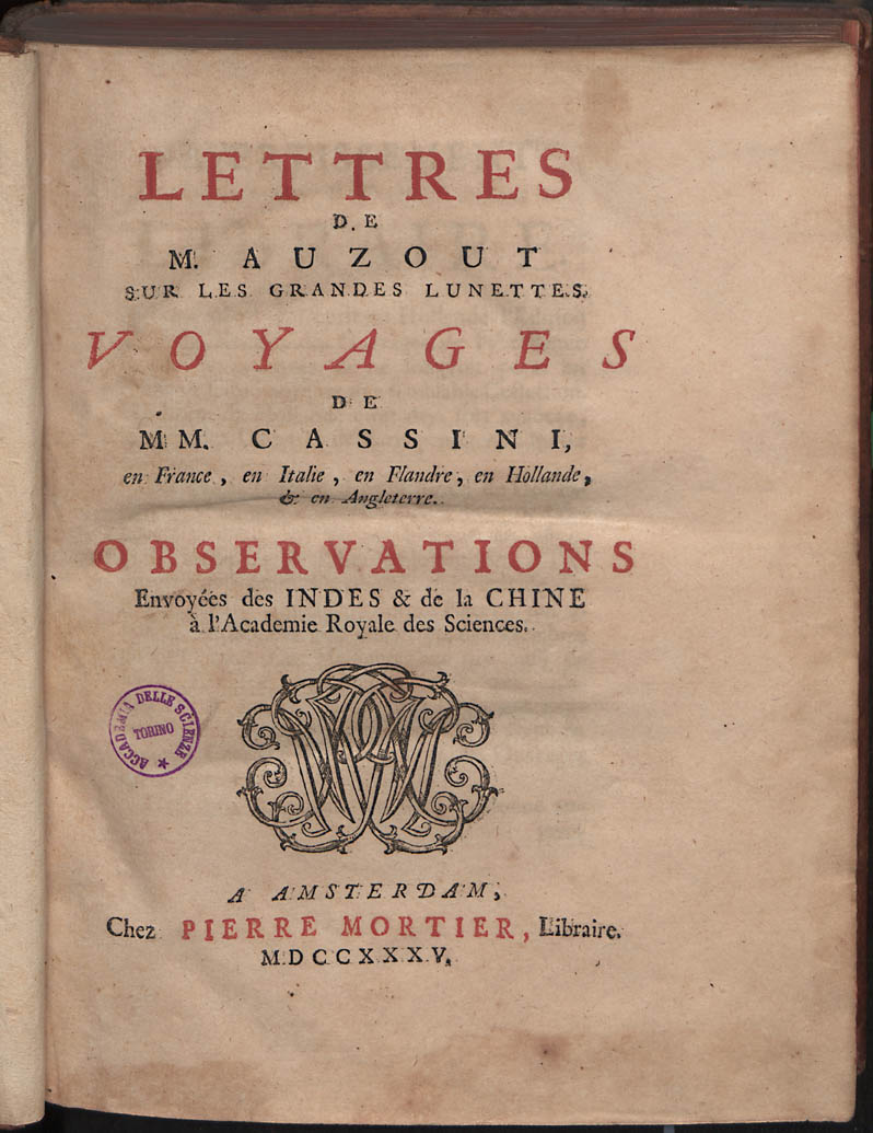 Frontespizio